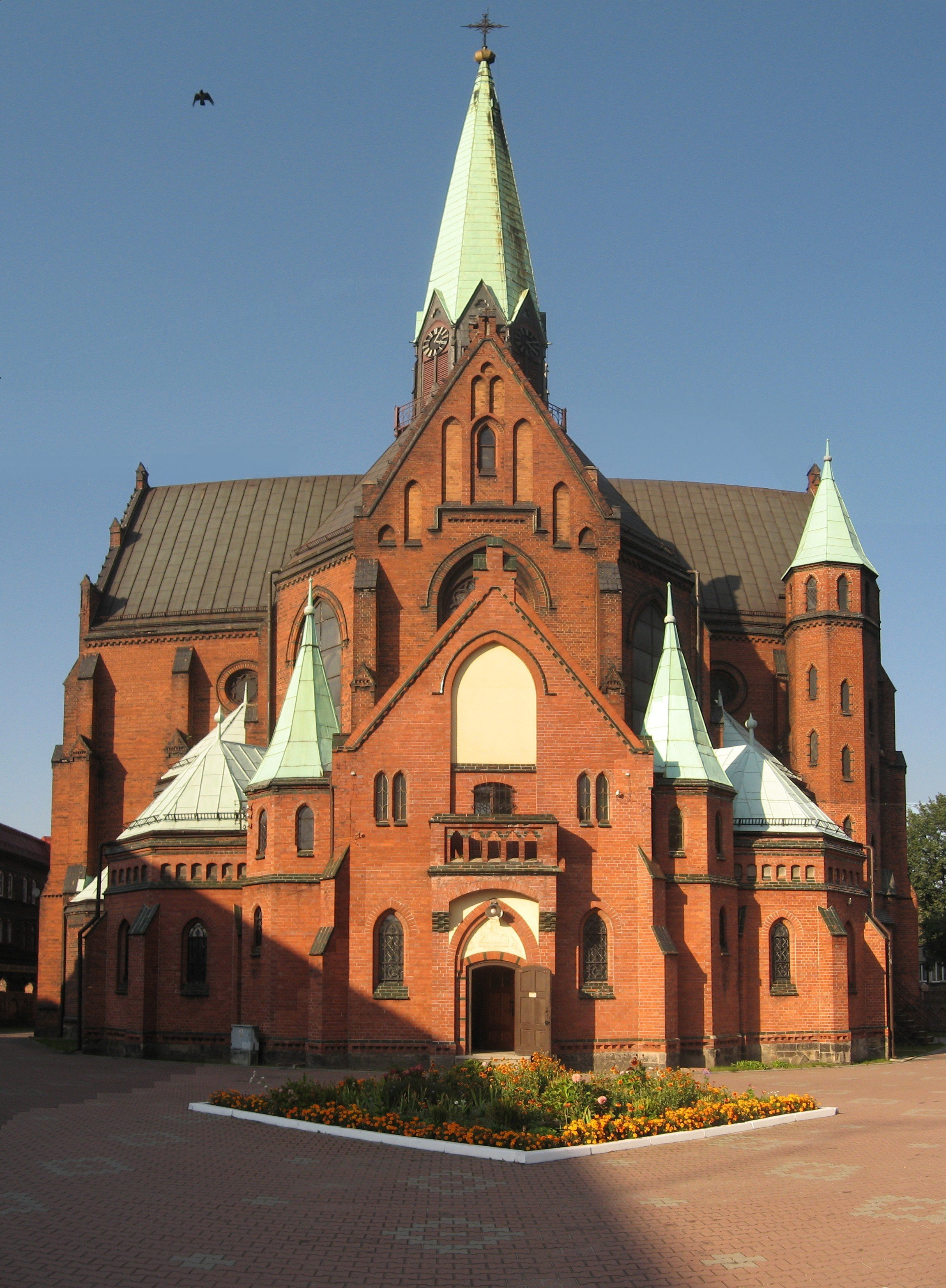 Katowice Załęże, kościół św. Józefa (zabytek nr rejestr. A/1236/78) , cs: Katovice Załęże, kostel sv. Josefa